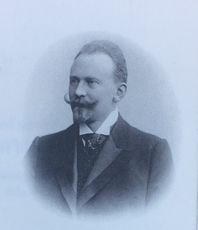 Gustav Uddgren. IMG 9283